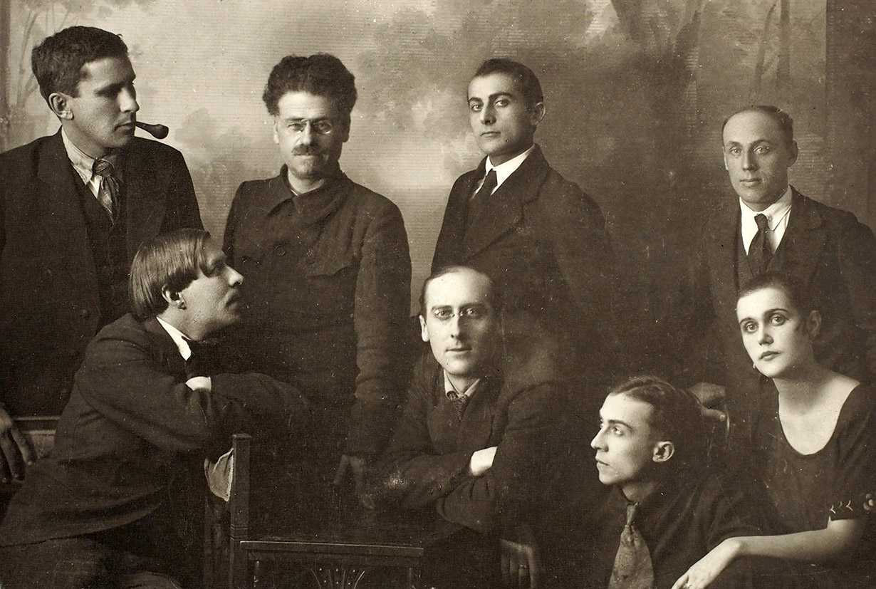 Дальневосточная группа "Творчество". Сидят (слева направо) Н. Асеев, С. Третьяков, В. Силлов, О. Петровская. Стоят В. Пальмов, Н. Чужак, М. Аветов, Н. Незнамов. 1920 (Чита, 1922?). Опубликовано в книге Н. Асеев. Родословная поэзии. М., 1990